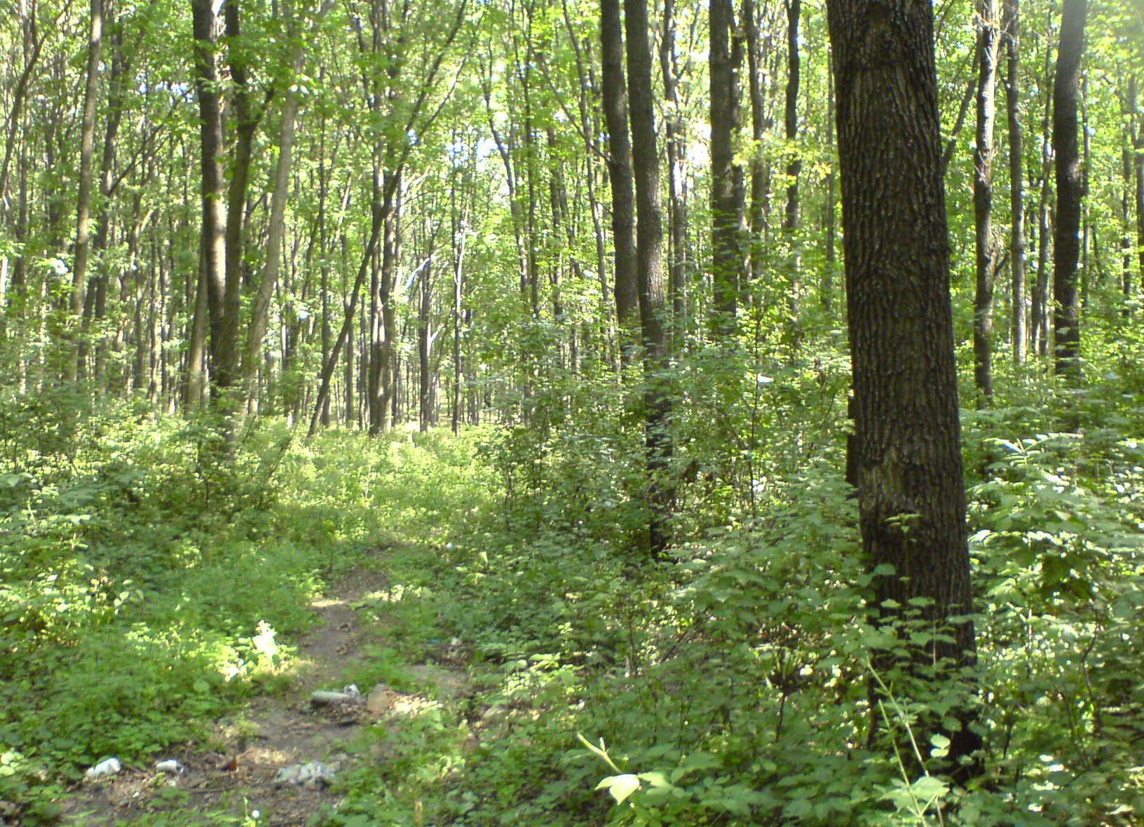 Лесопарк в Любовке, Харьковская область